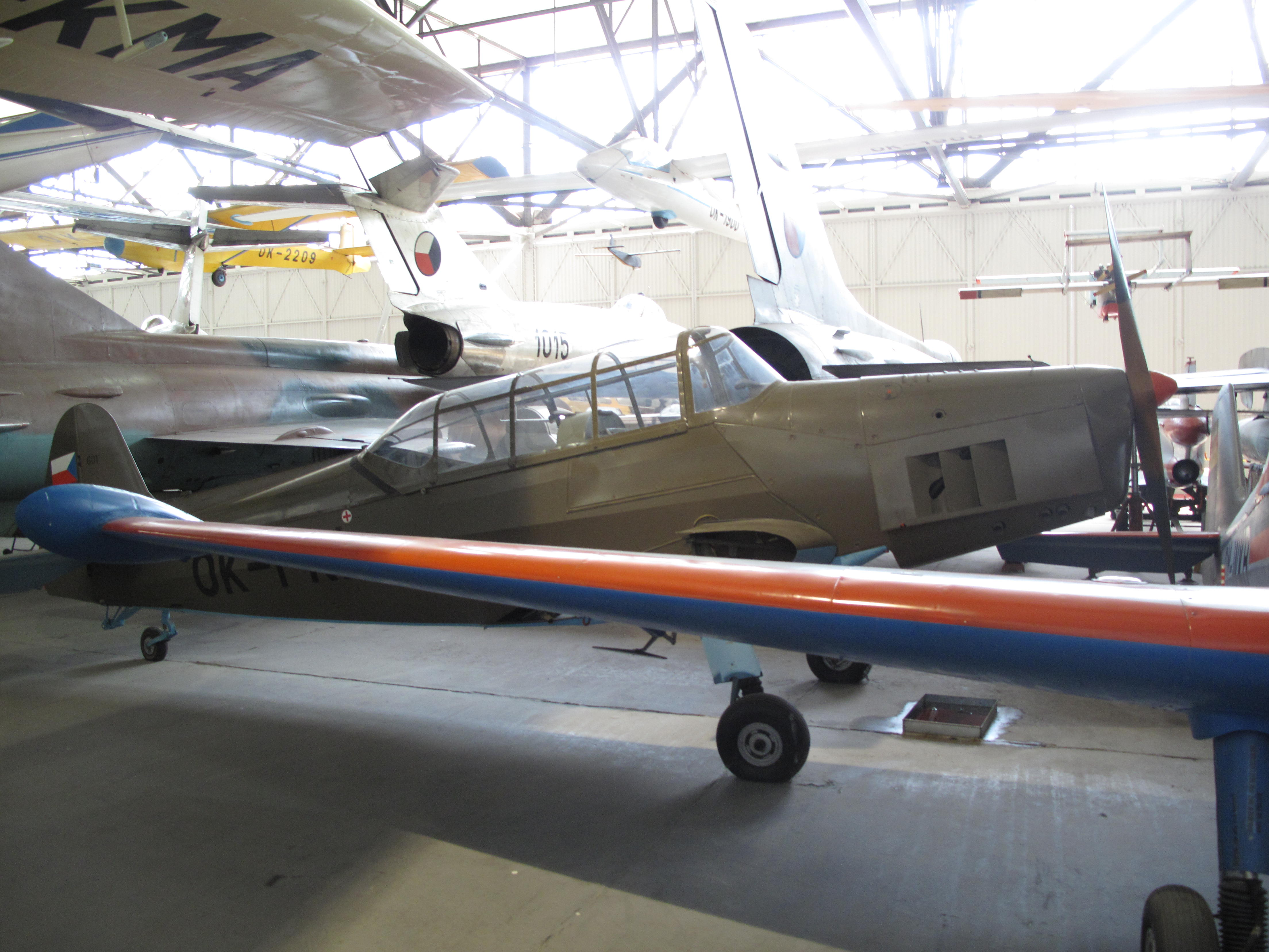 Zlín Z-26 (OK-FRI); Letecké muzeum Kbely